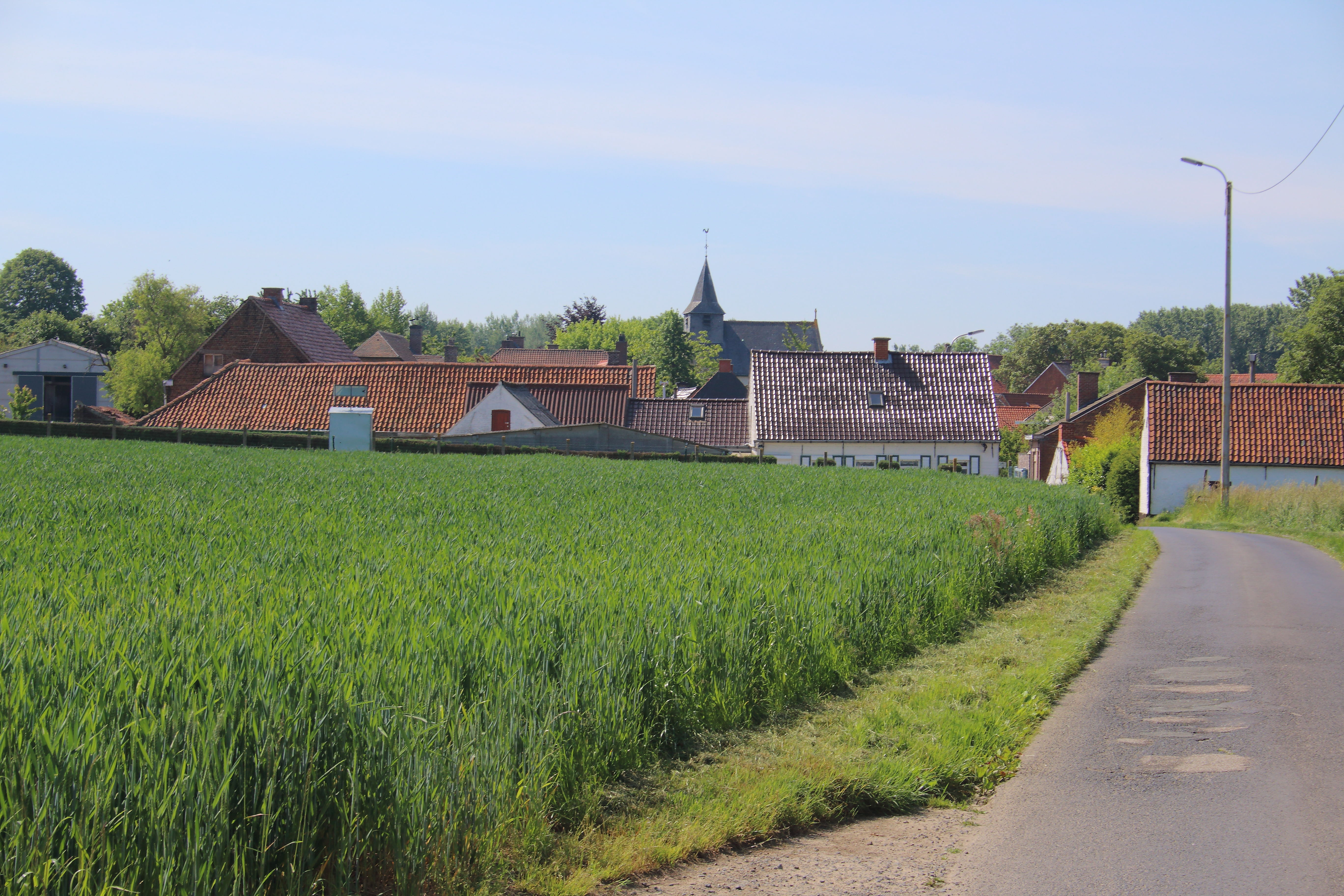 Volkegem, Oudenaarde, Vlaanderen, België